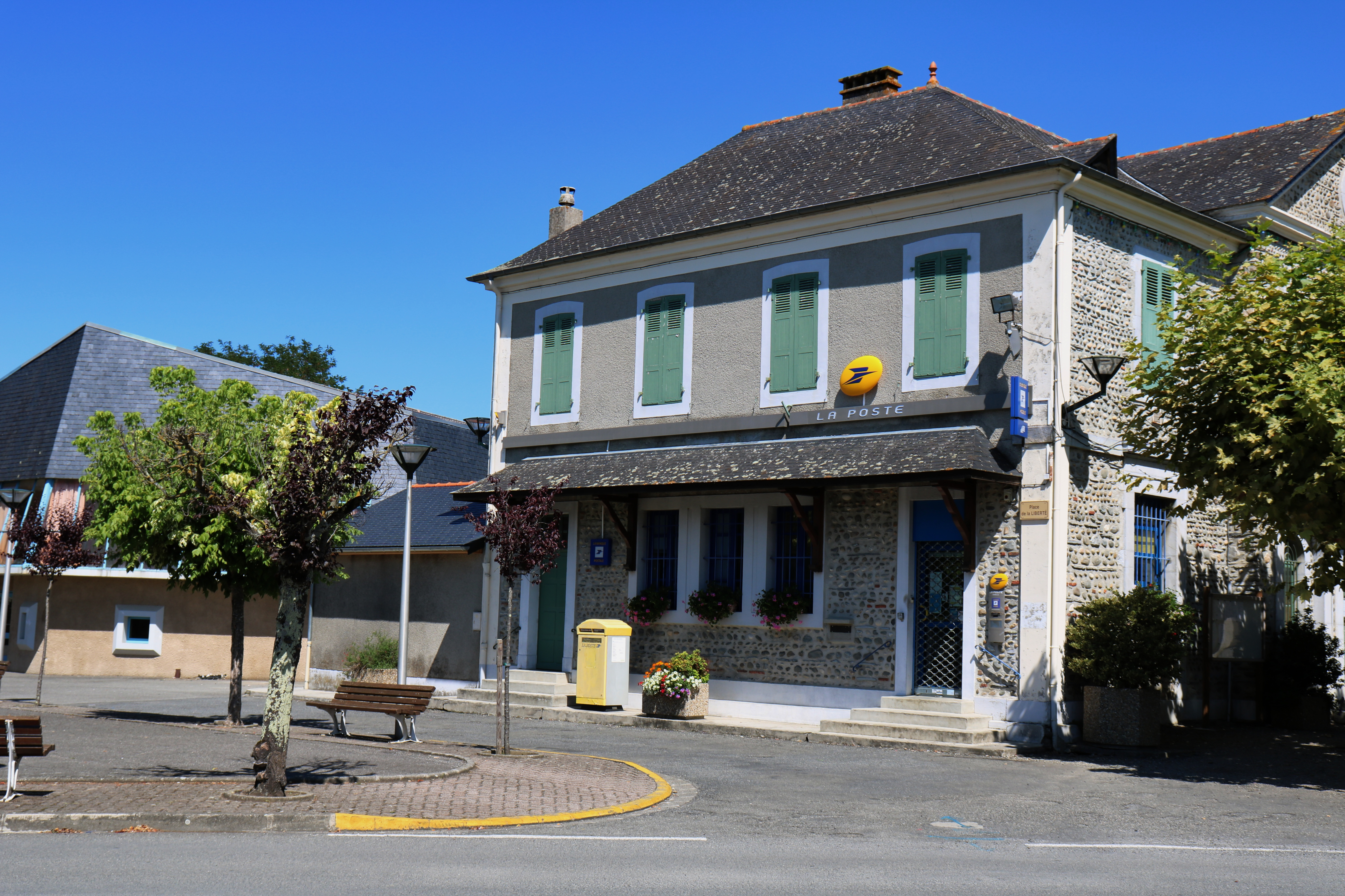 Agence postale de la commune de OURBELILLE (Hautes-Pyrénées)